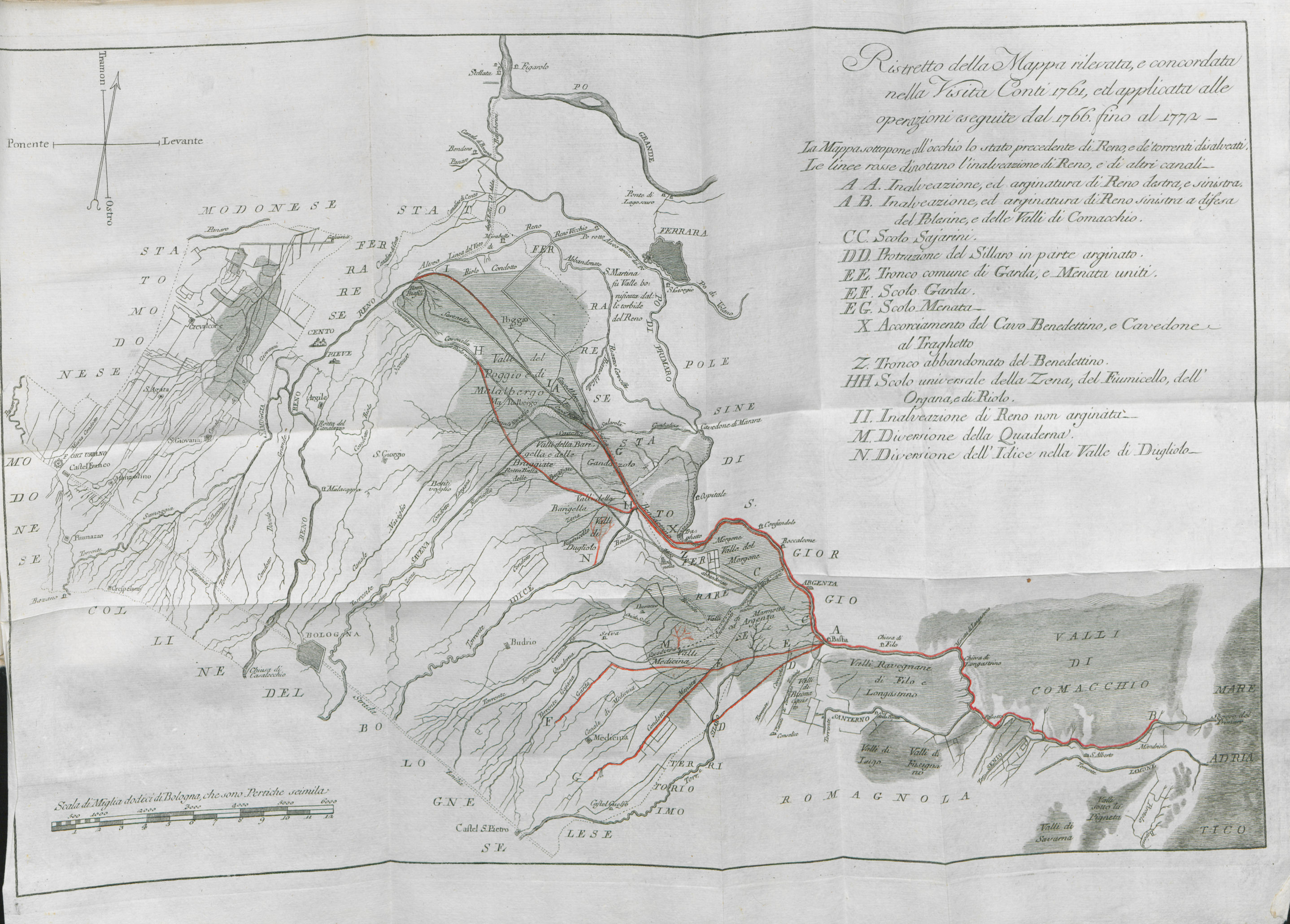 Tavola calcografica